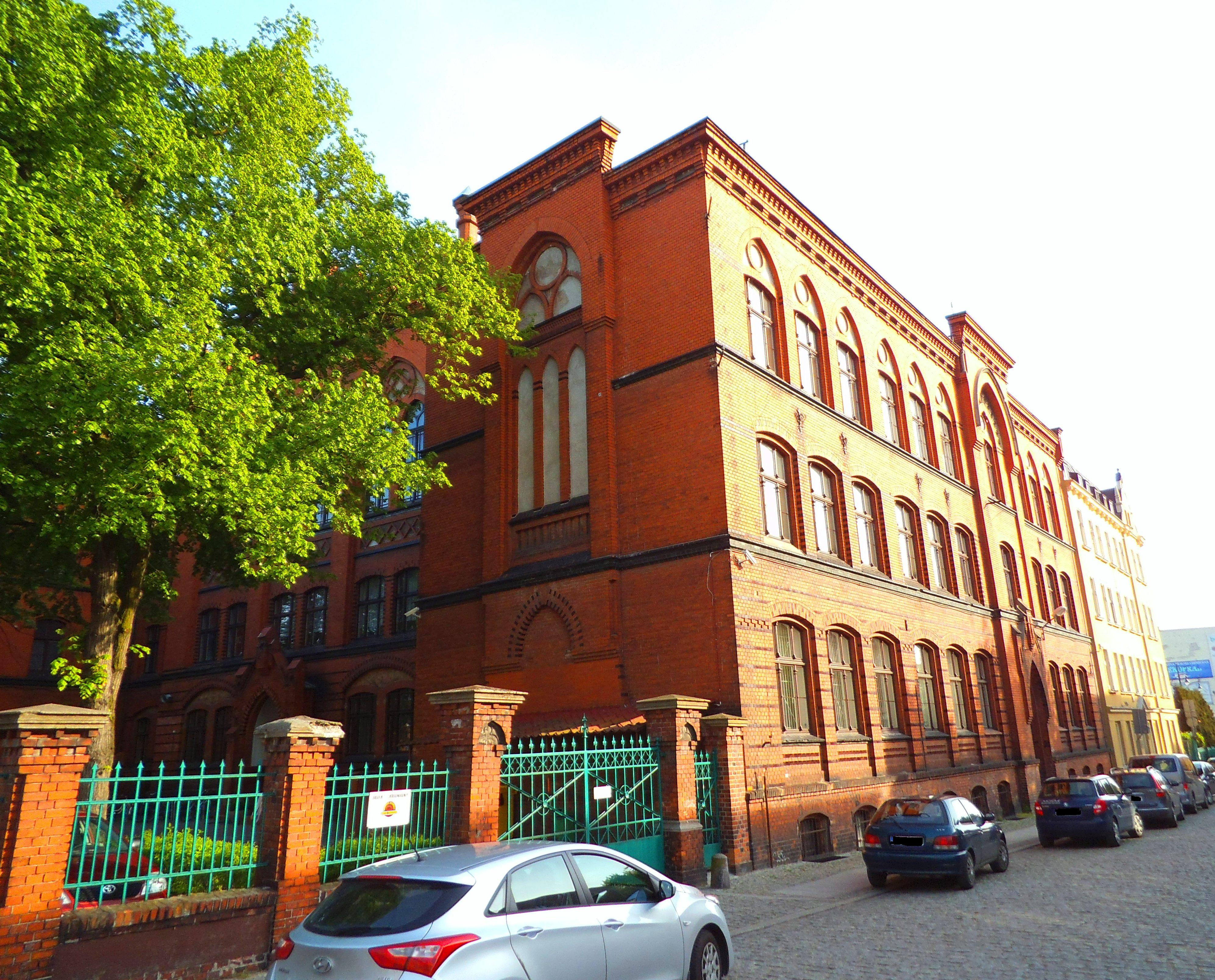 Budynek Centrum Kształcenia Ustawicznego w Toruniu1